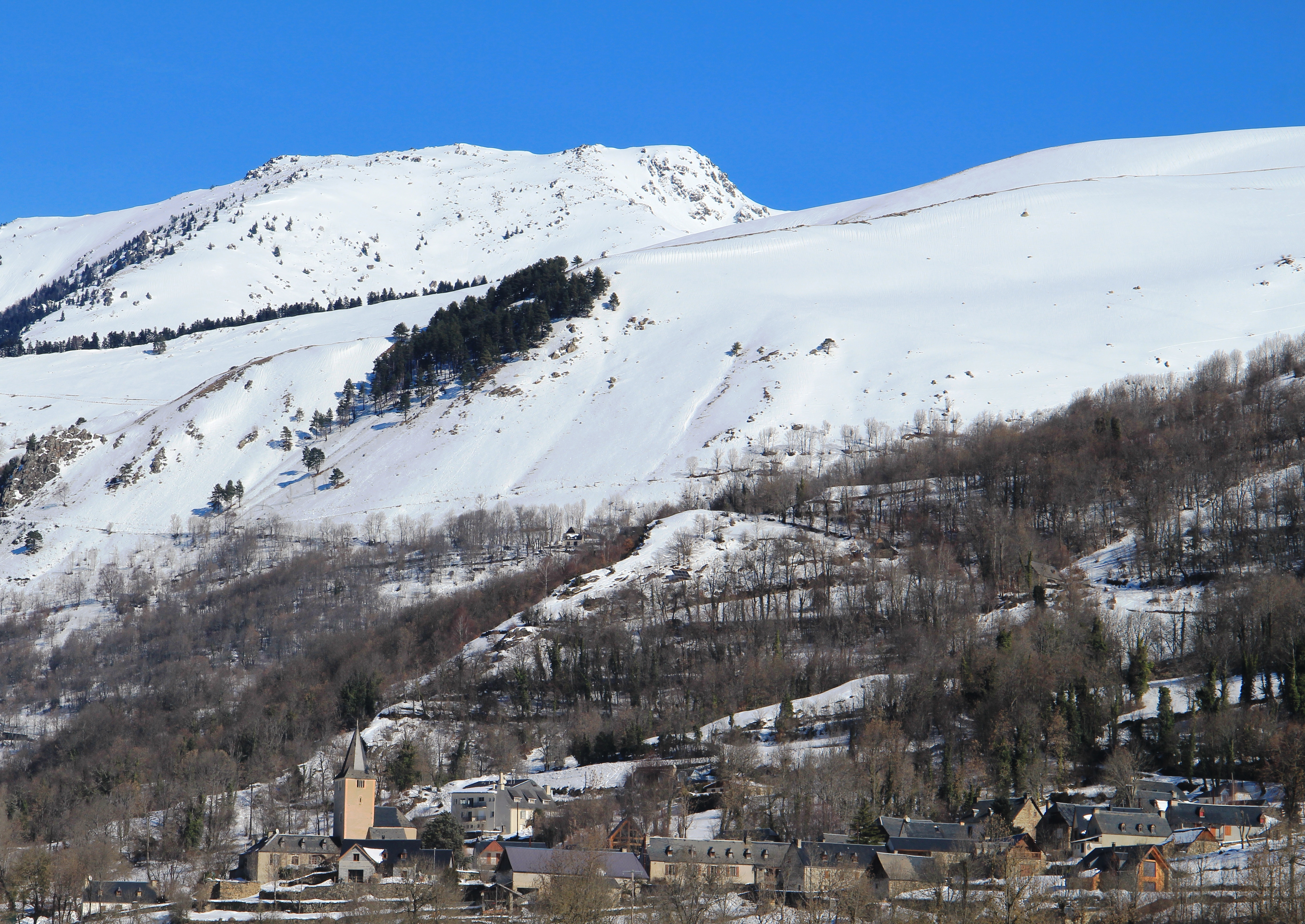 Estarvielle (Hautes-Pyrénées)